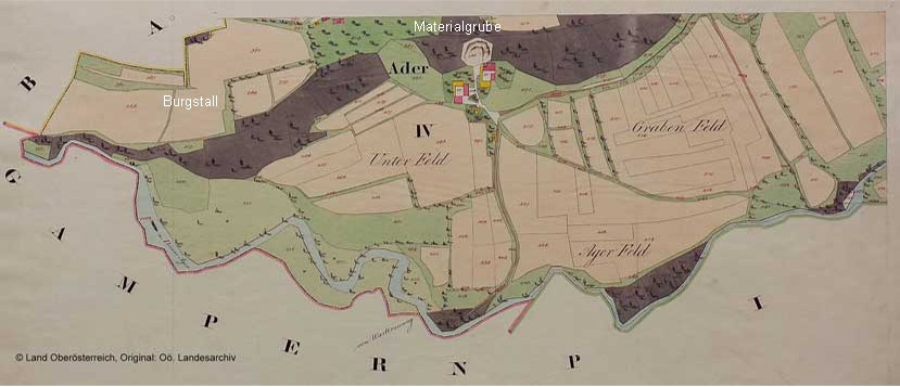 Lage der Hausberganlage Perkheim